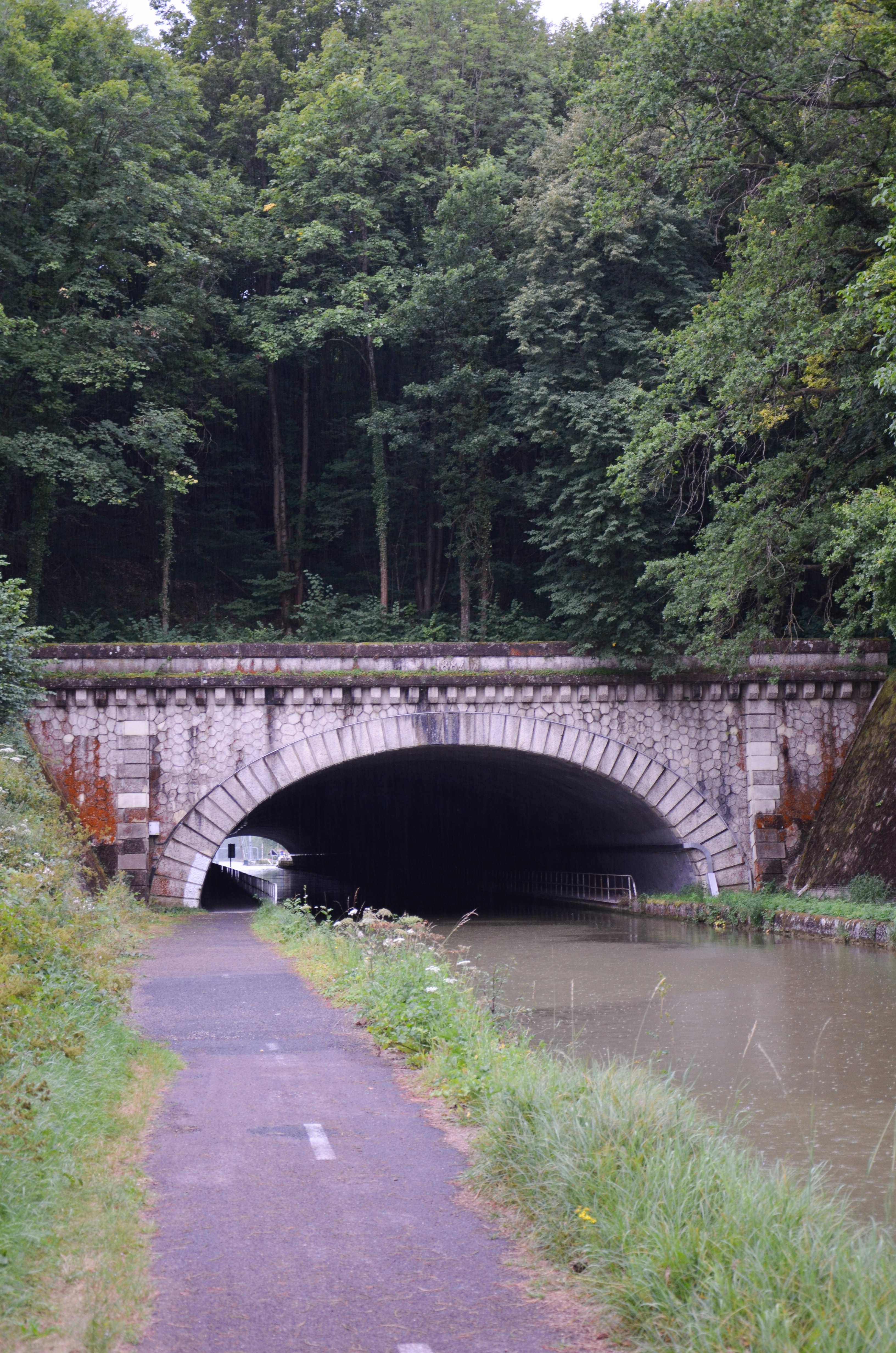 Tunnel de Condes sur le canal de la Marne à la Saone, Haute-Marne, Champagne-Ardennes, France